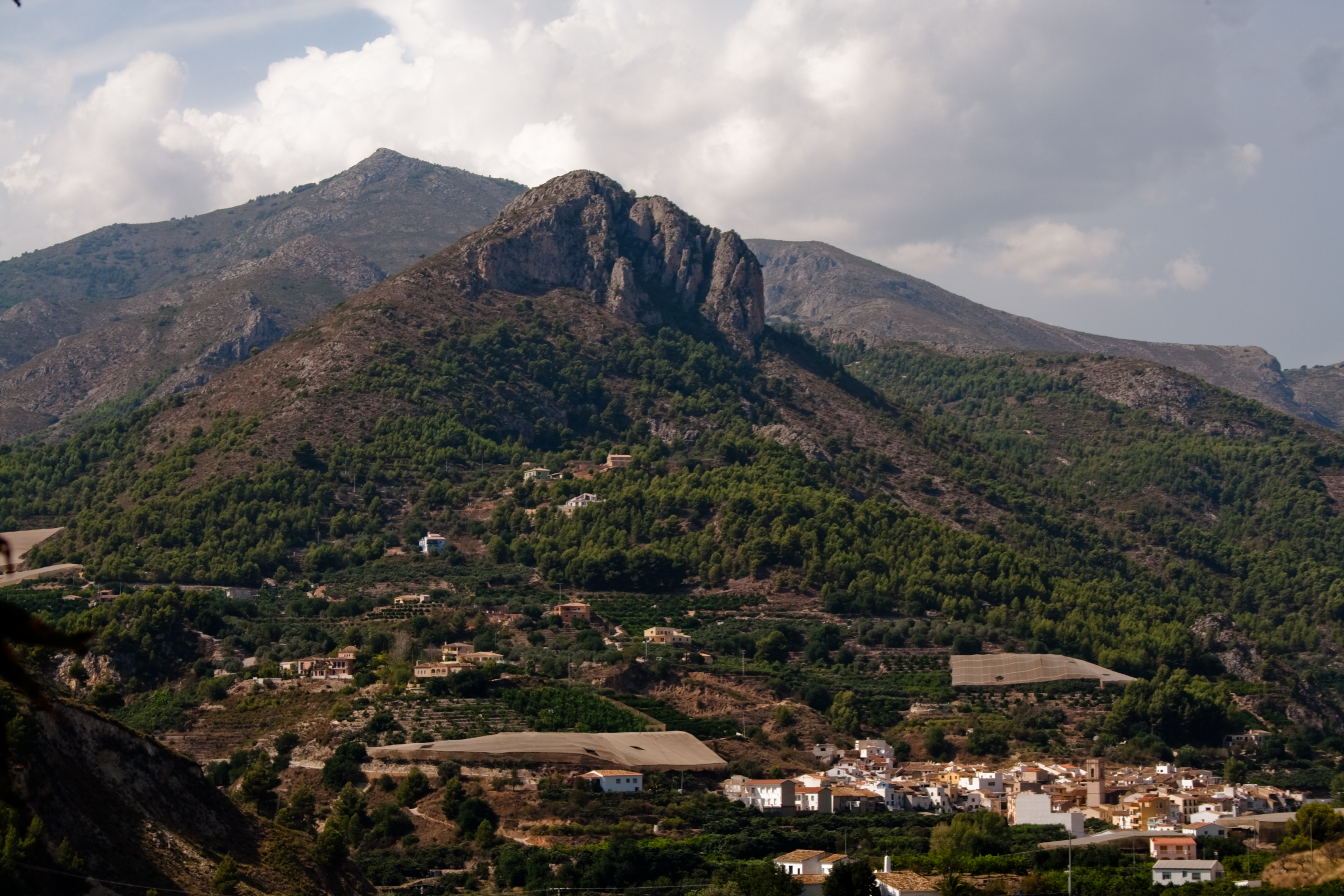 Municipi de Bolulla (Marina Baixa, País Valncià) als peus de la Penya de l'Or.